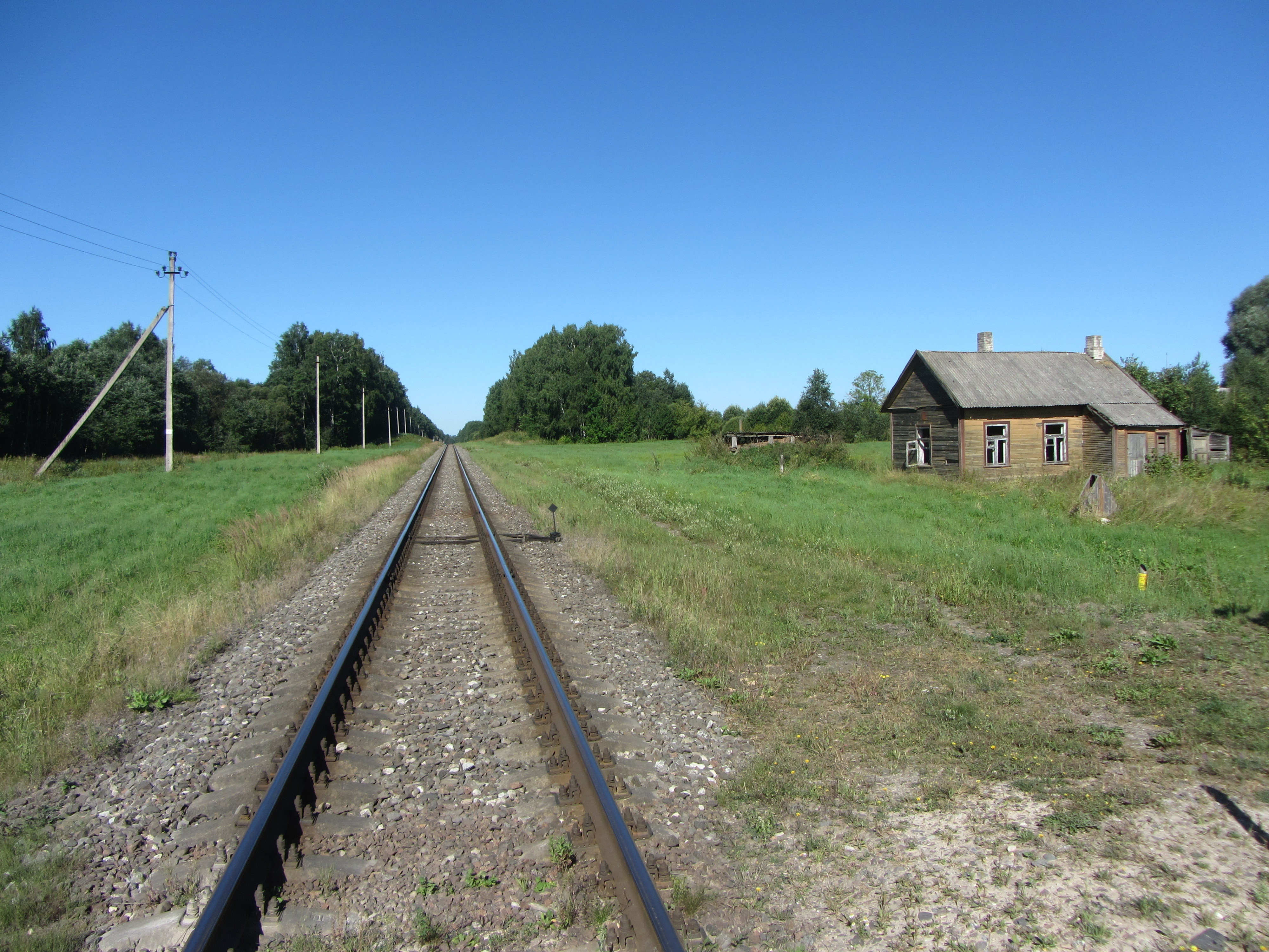 Obelių sen., Lithuania